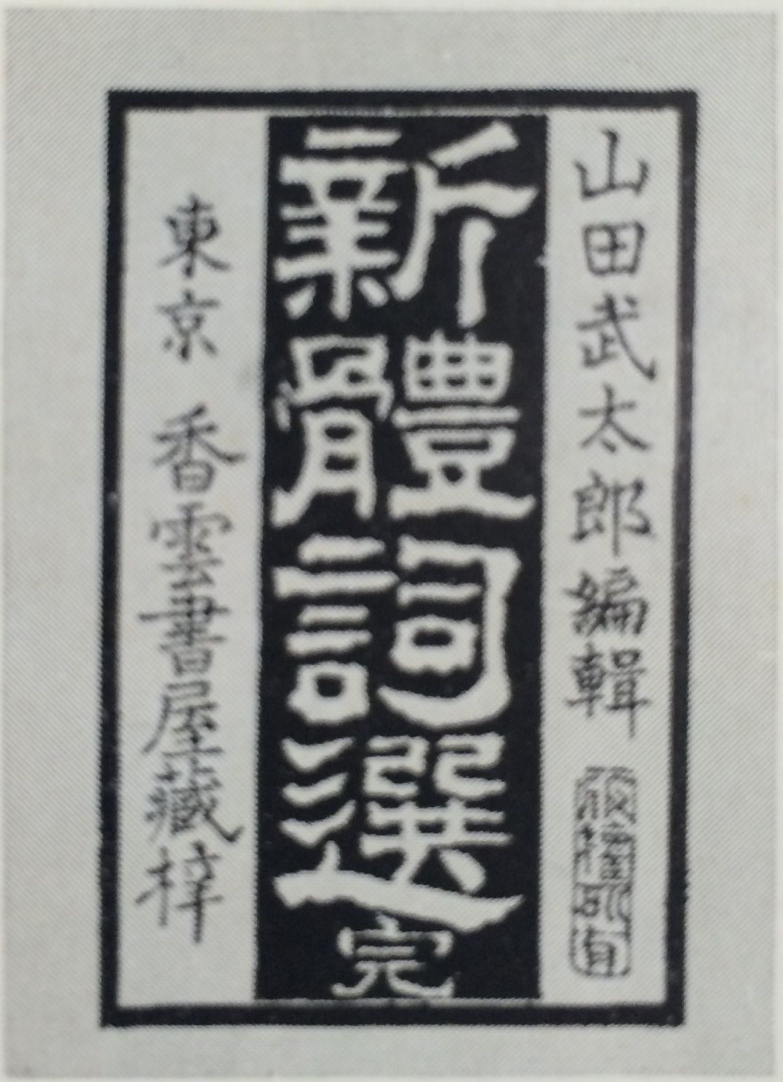 山田武太郎編『新体詩選』1886年初版表紙